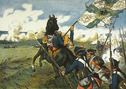 La muerte del Mariscal Schwerin en la batalla de Praga (1757)